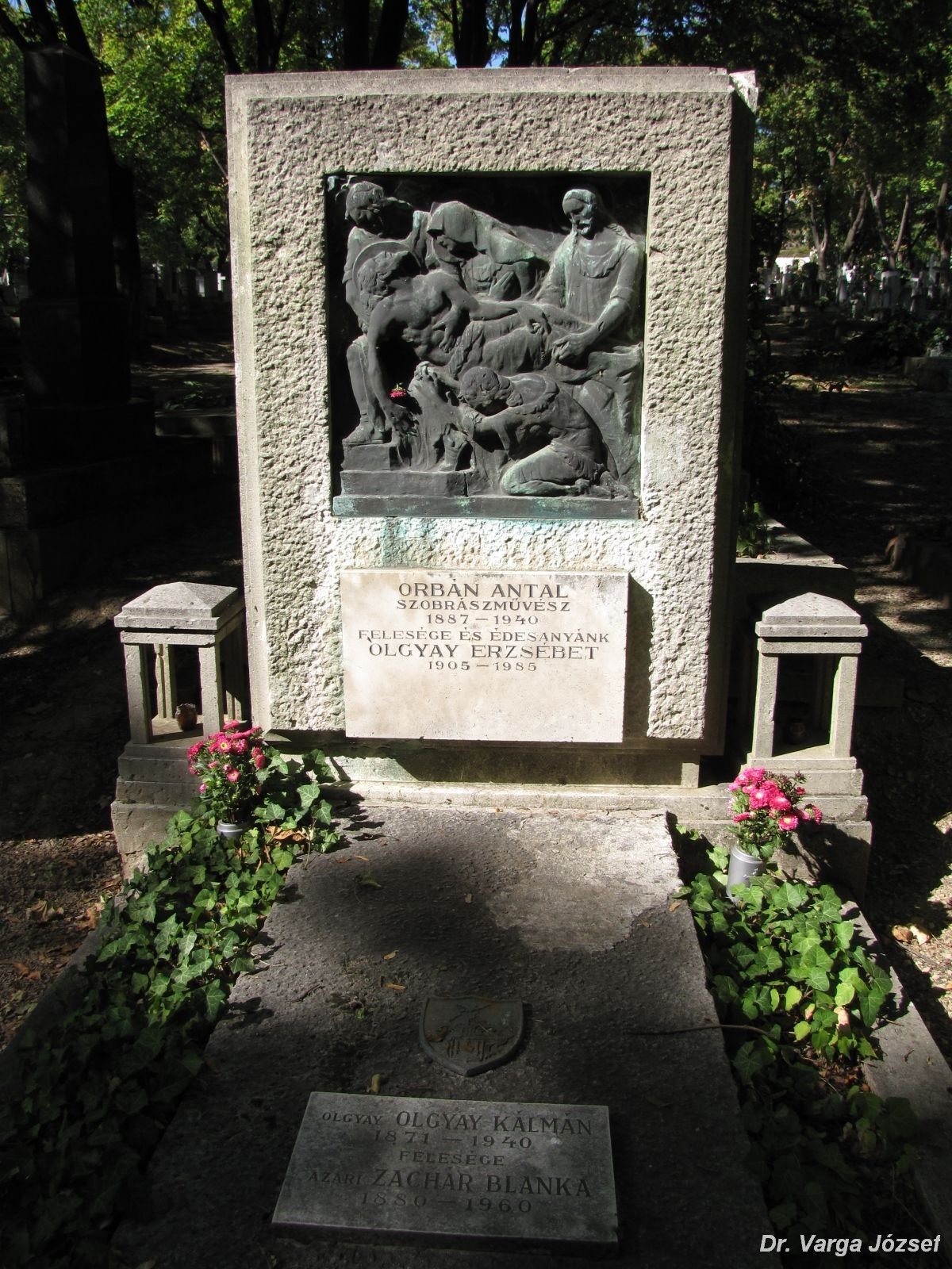 Orbán Antal (Pusztakalán, Hunyad vm., 1887. ápr. 24.-Bp., 1940. dec. 27.) szobrász sírja Budapesten. Farkasréti temető: 6/7-1-3/4 [szobrász: Orbán Antal].